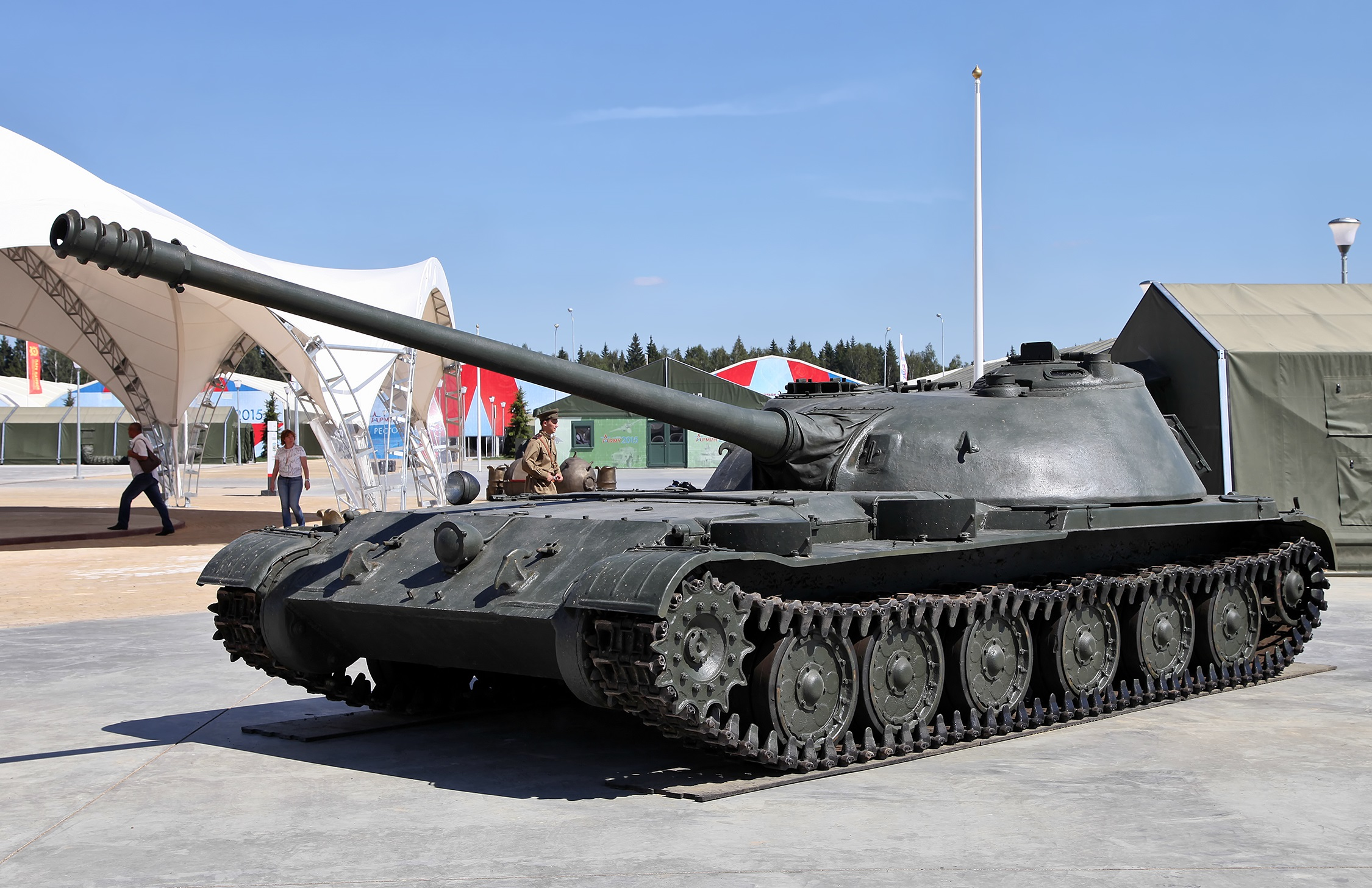 Самоходная пушка СУ-100М в экспозиции парка "Партриот".